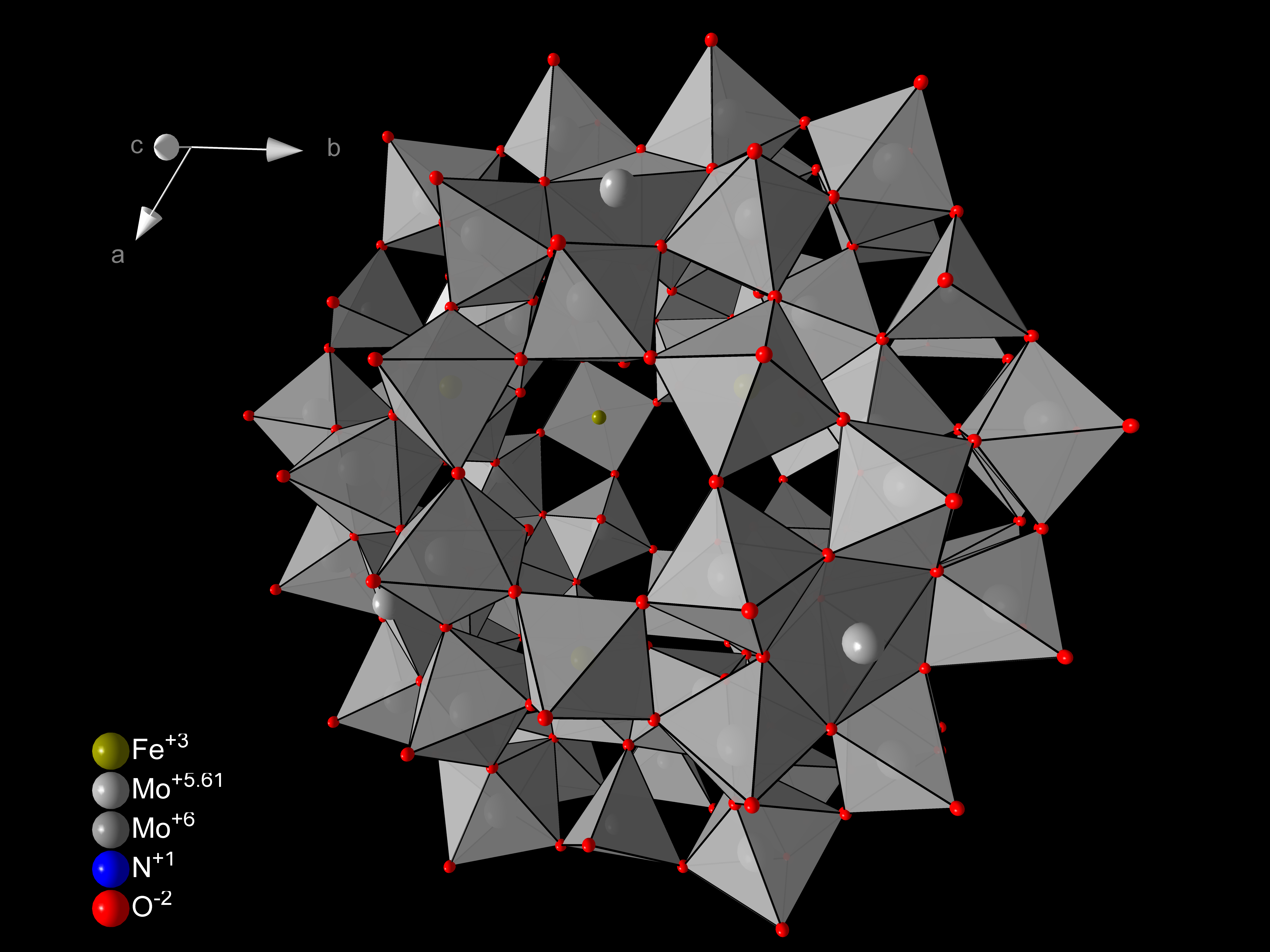 Ein Molybdän-braun Polyoxometallat vom Typ [Mo57Fe6].